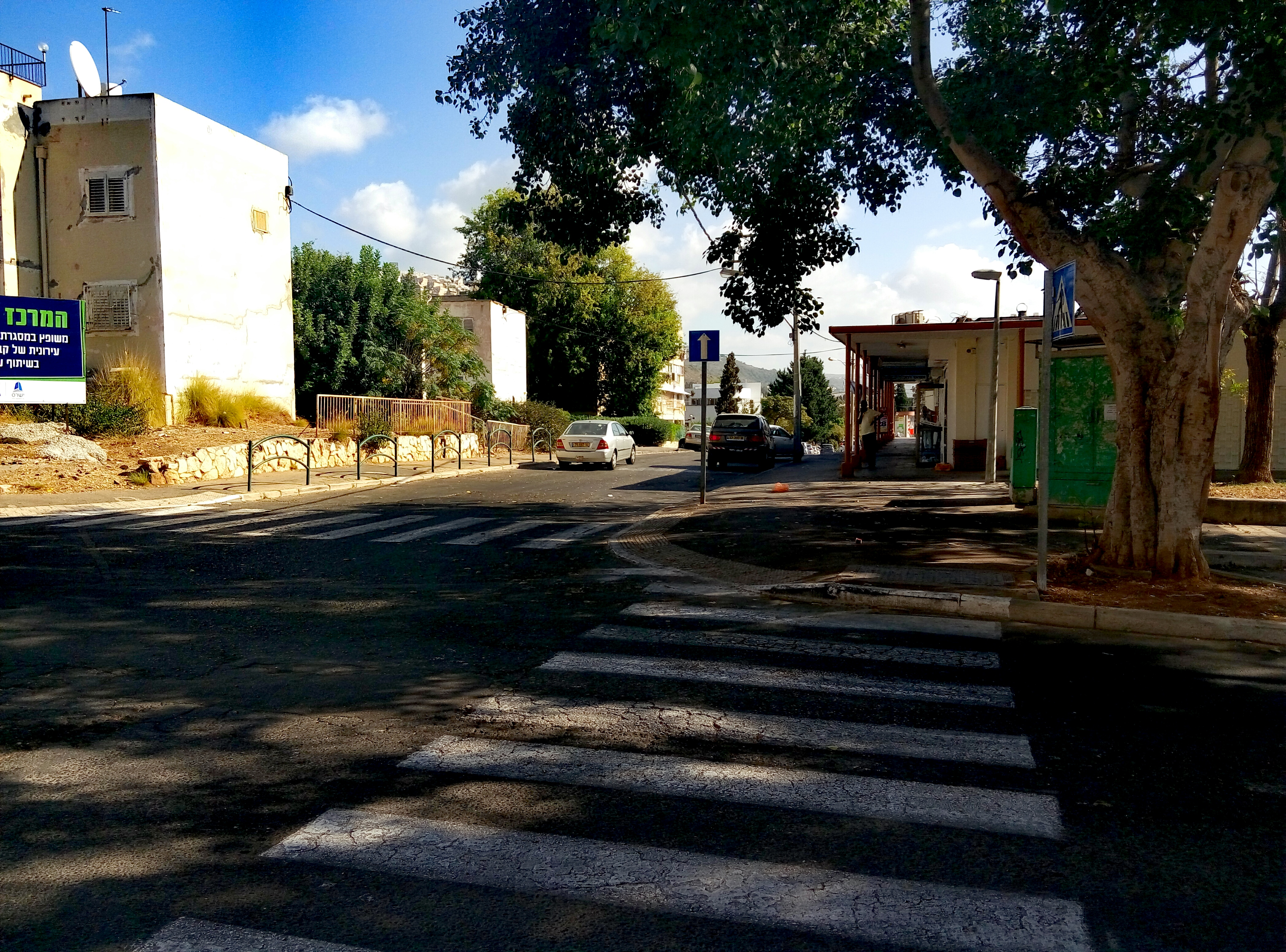 המרכז המסחרי במתחם המלך עוזיהו בשכונת נווה דוד בחיפה, המיועד לפרוייקט פינוי בינוי